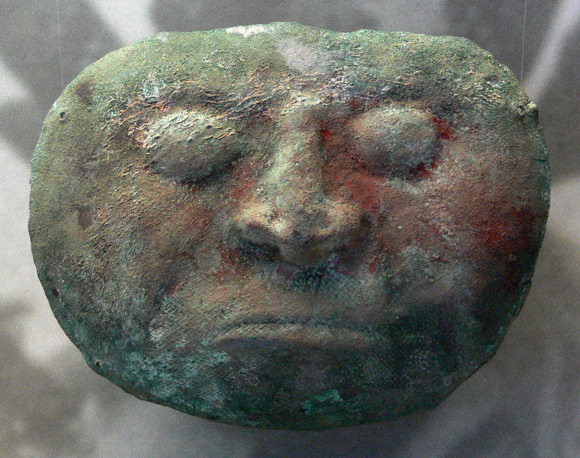 Schaffhausen, Museum zu Allerheiligen, Sammlung Ebnöther, (Abteilung "Masken") Maske, Kupfer mit roter Bemalung, Peru, nördliche Küstenregion, Vicús, 500 v. Chr. - 400 n. Chr.